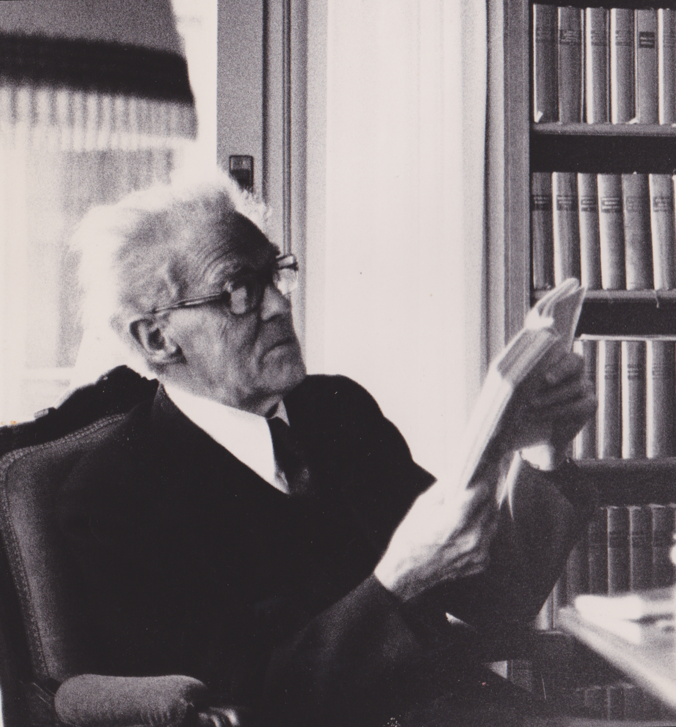 Portrait